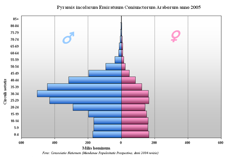 Pyramis incolarum Emiratuum Coniunctorum Araborum